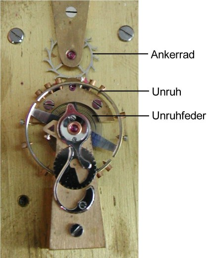 Echapement eines Uhrwerks. Ausschnitt aus der Gesellenprüfung eines Uhrmachermeisters